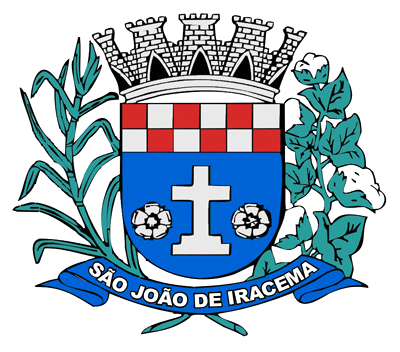 Brasão_do_Municipio_de_São_João_de_Iracema